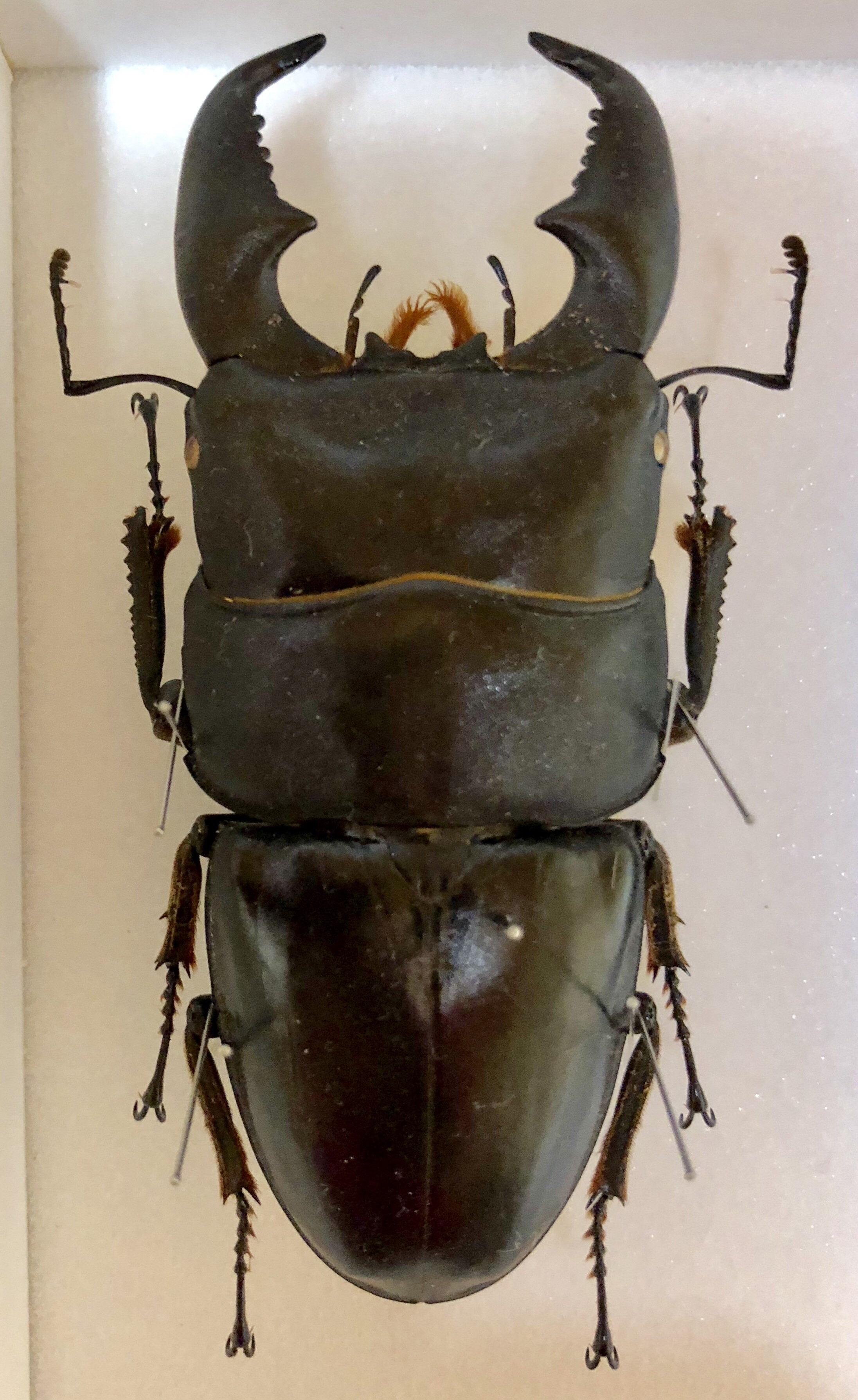 ヒラタクワガタ スマトラ島100㎜ 頭幅36㎜ 胸幅38㎜